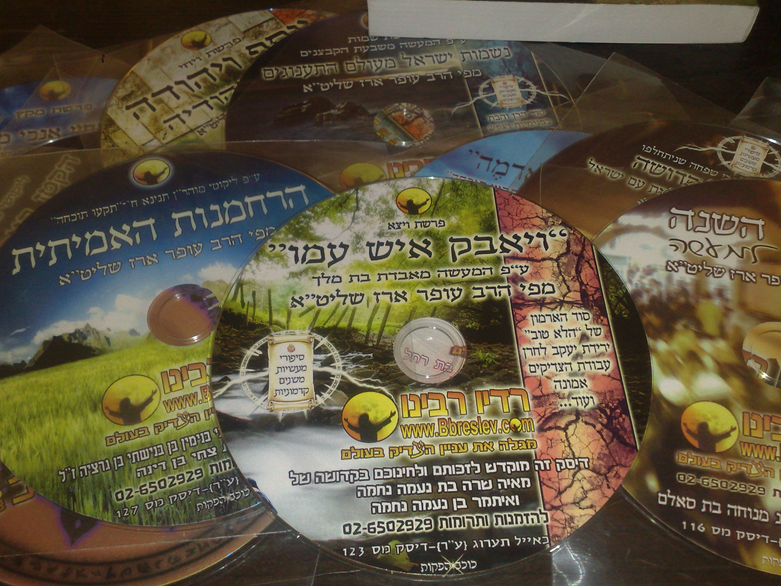 דיסקים מסדרת רדיו רבינו